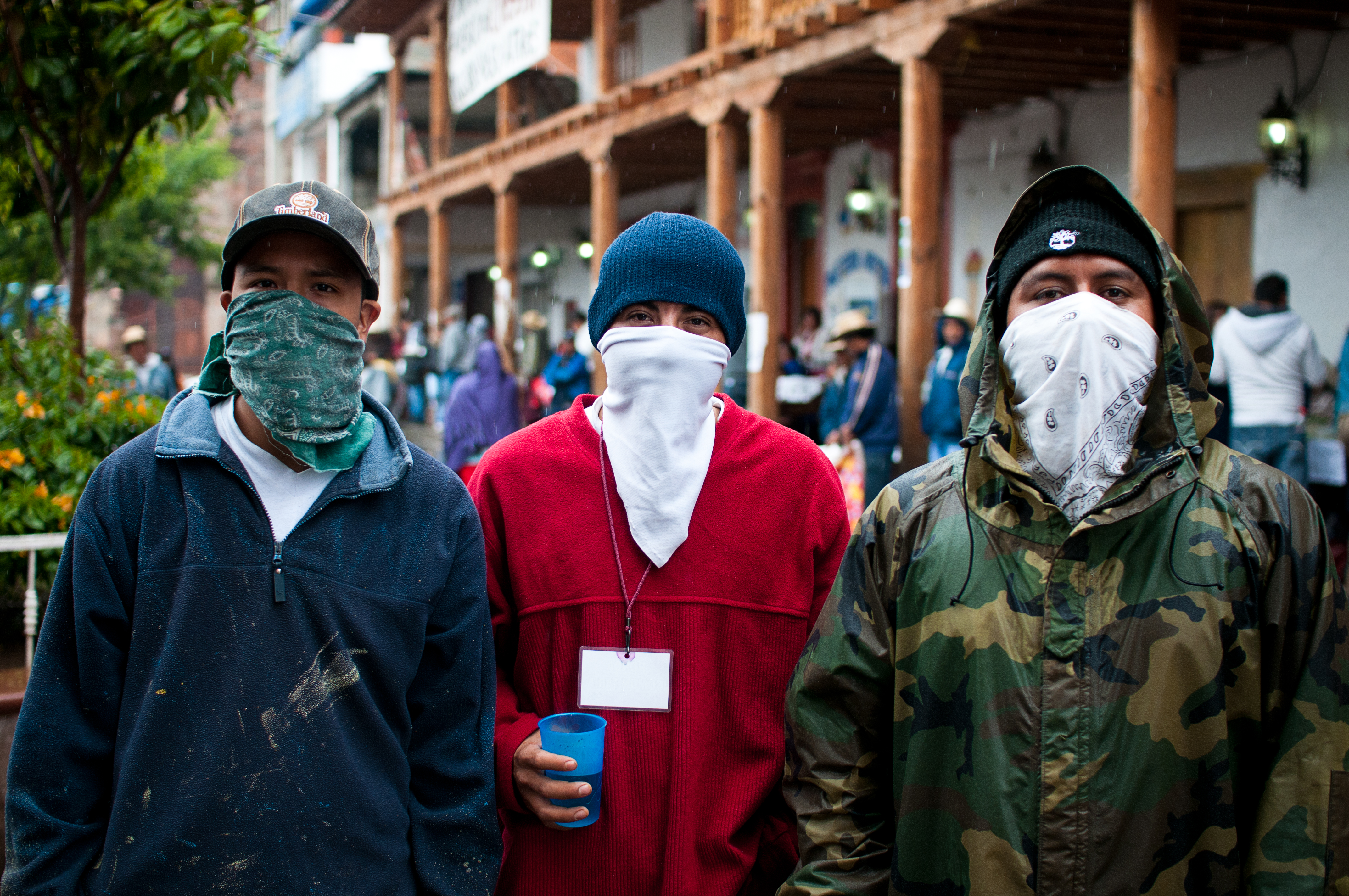 Los jóvenes de Cherán vigilan las calles con los rostros cubiertos para evitar represalias por parte de los "enemigos", los talamontes y el crimen organizado. Más fotos en esta presentación en Youtube: Ayuda a Cherán